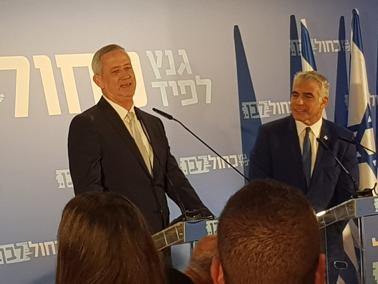 מסיבת עיתונאים - רשימת כחול לבן